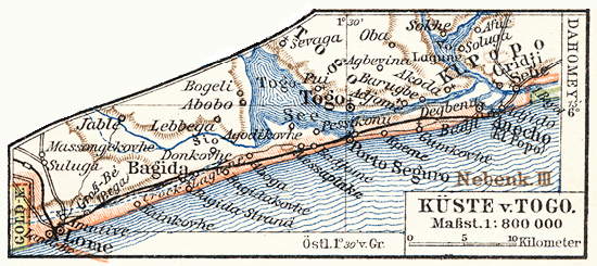 Føroyskt: ekkert